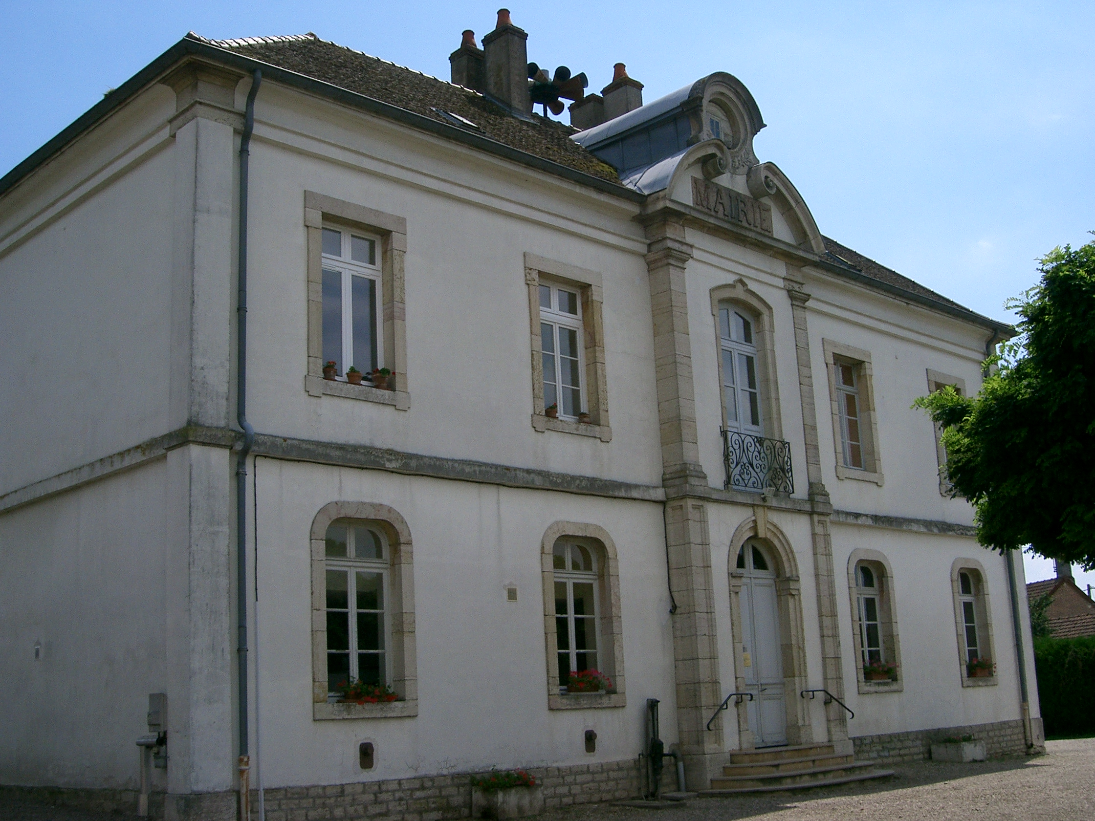 Image:Charnay-les-Chalon (Saône et Loire)- Mairie Ecole